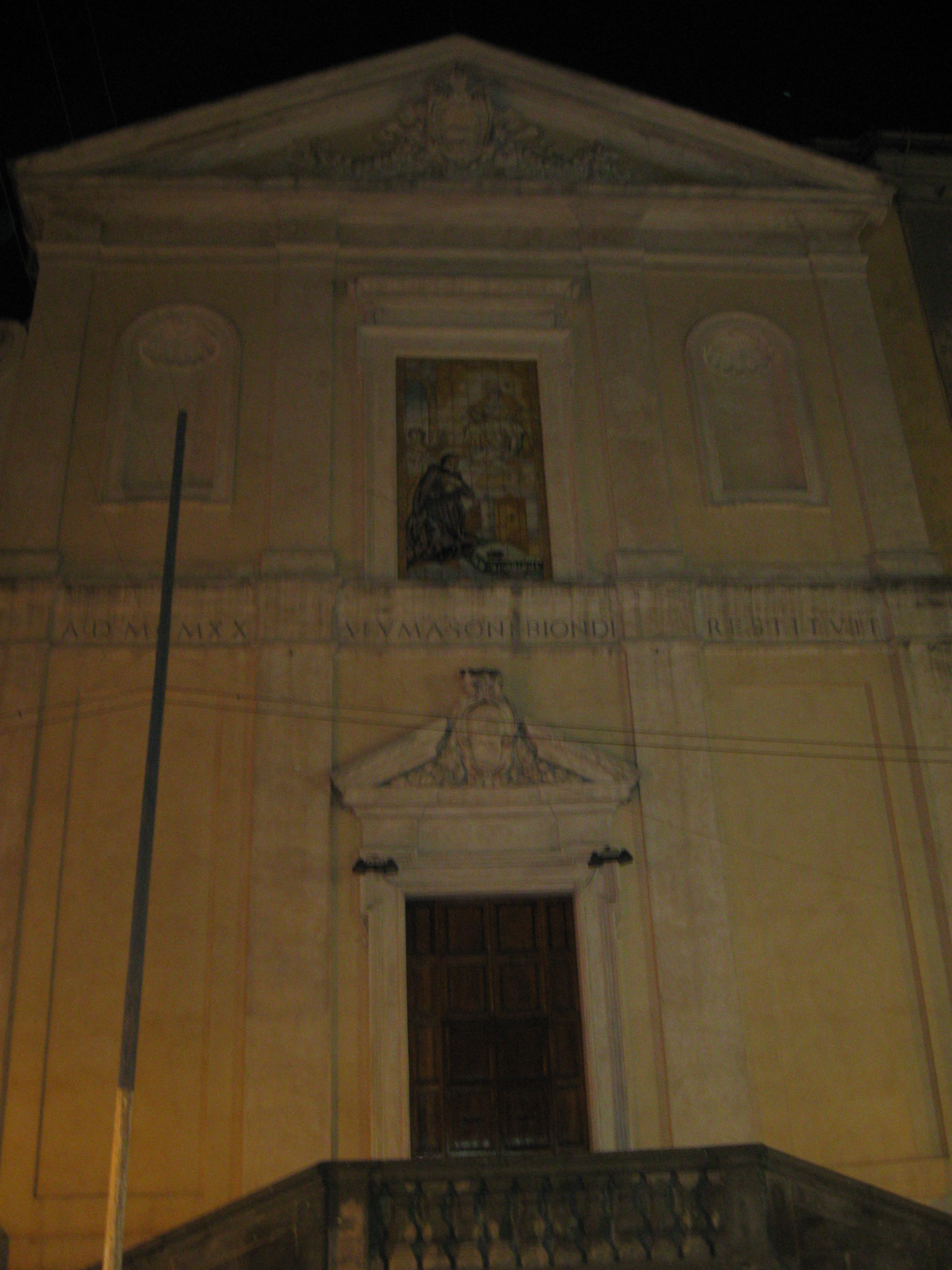 La Chiesa della Santissima Trinità a Marino (RM)